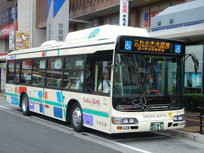 稲毛駅東口バスロータリーにて、平和交通のバス